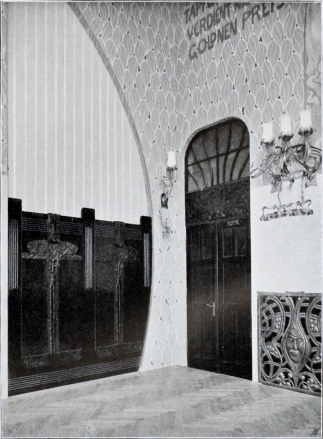 Originalbildunterschrift:„Künstlerhaus in Leipzig Ecke im Saal ••••••• Arch. Fritz Drechsler“